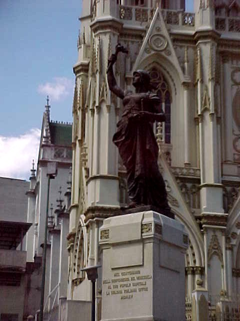 Iglesia de Palo Grande en municipio Libertador, Distrito Capital - Venezuela